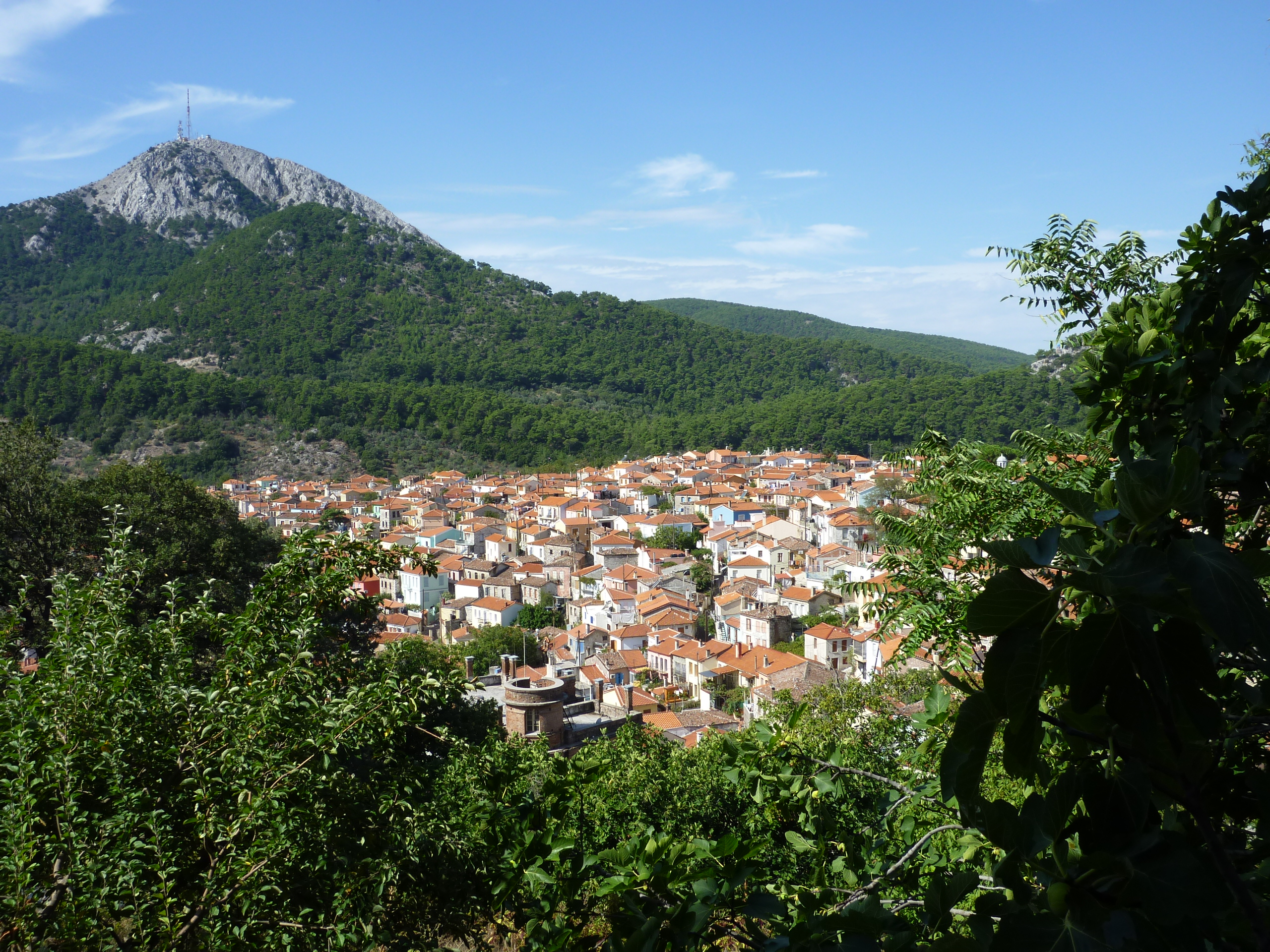 Blick auf den Wallfahrtsort Agiassos auf der griechischen Insel Lesbos. Im Hintergrund ist der 968 m hohe Olympos zu sehen.